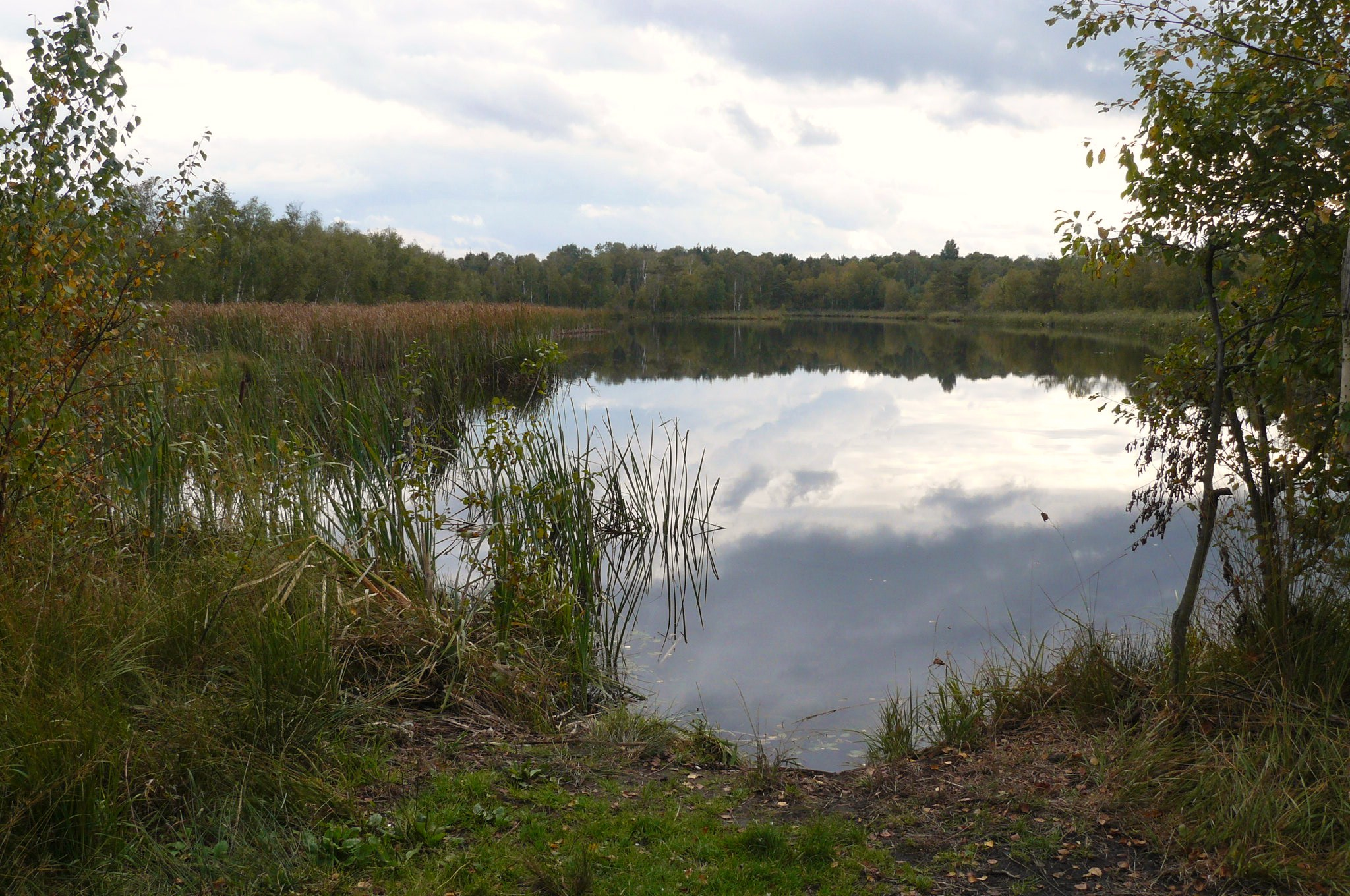 Bagno Chlebowo - torfowisko (torfianki). Gm. Ryczywół.